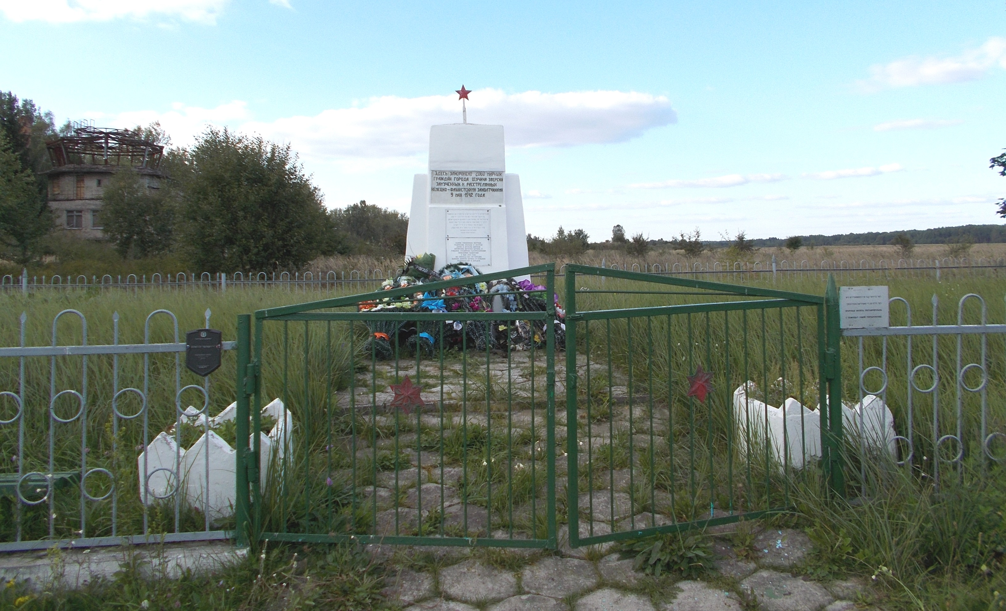 Памятник евреям Рожанки и Щучина, убитым нацистами и их пособниками 9 мая 1942 года. Находится возле Щучина.